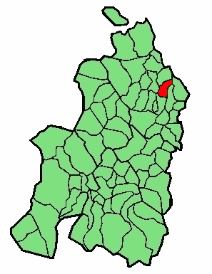 aipaturiko udalerriaren kokapena Nafarroa Beherean